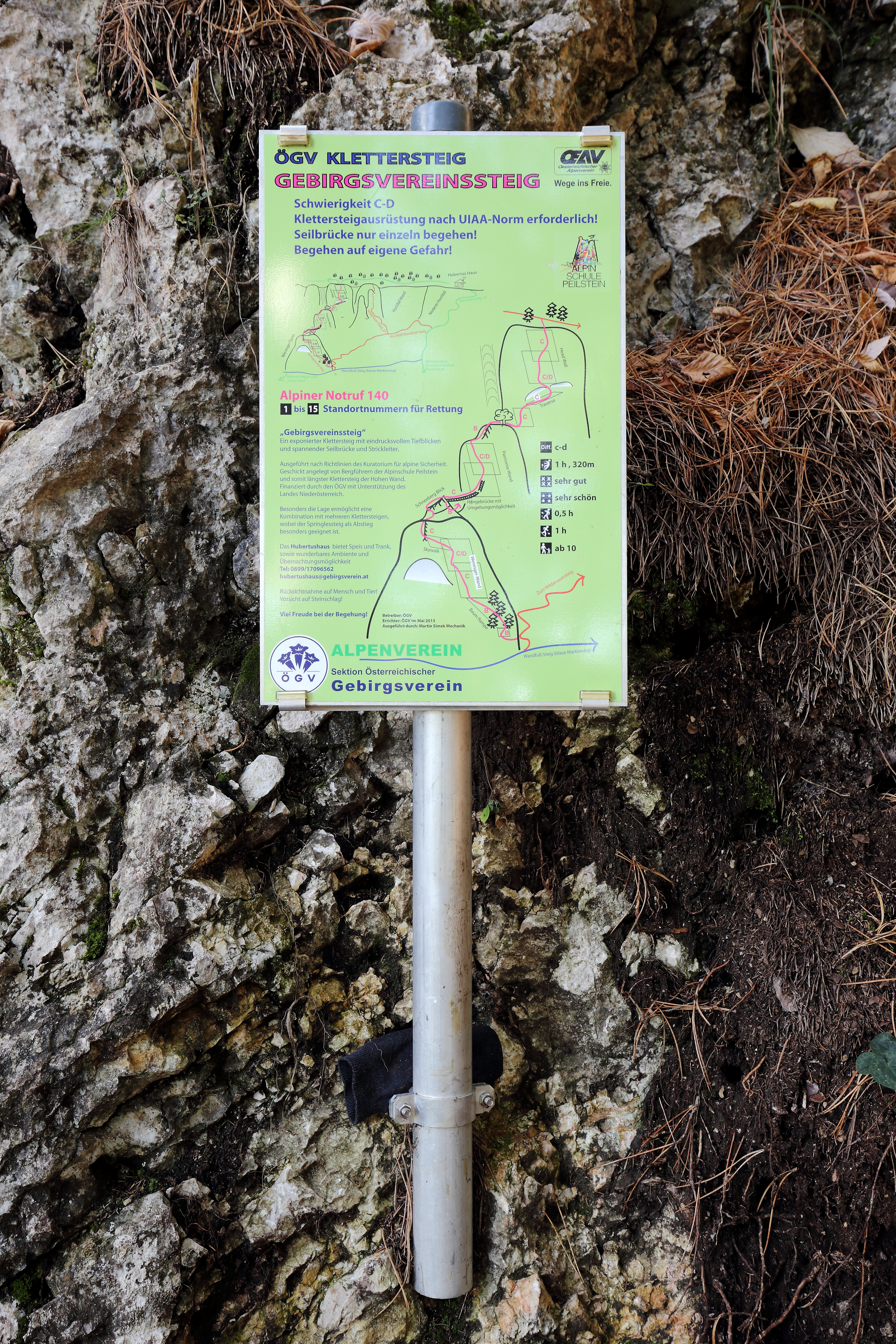 Infotafel mit Topografie beim unteren Einstieg des Gebirgsvereinssteiges an der Hohen Wand (Gemeindegebiet Höflein an der Hohen Wand).